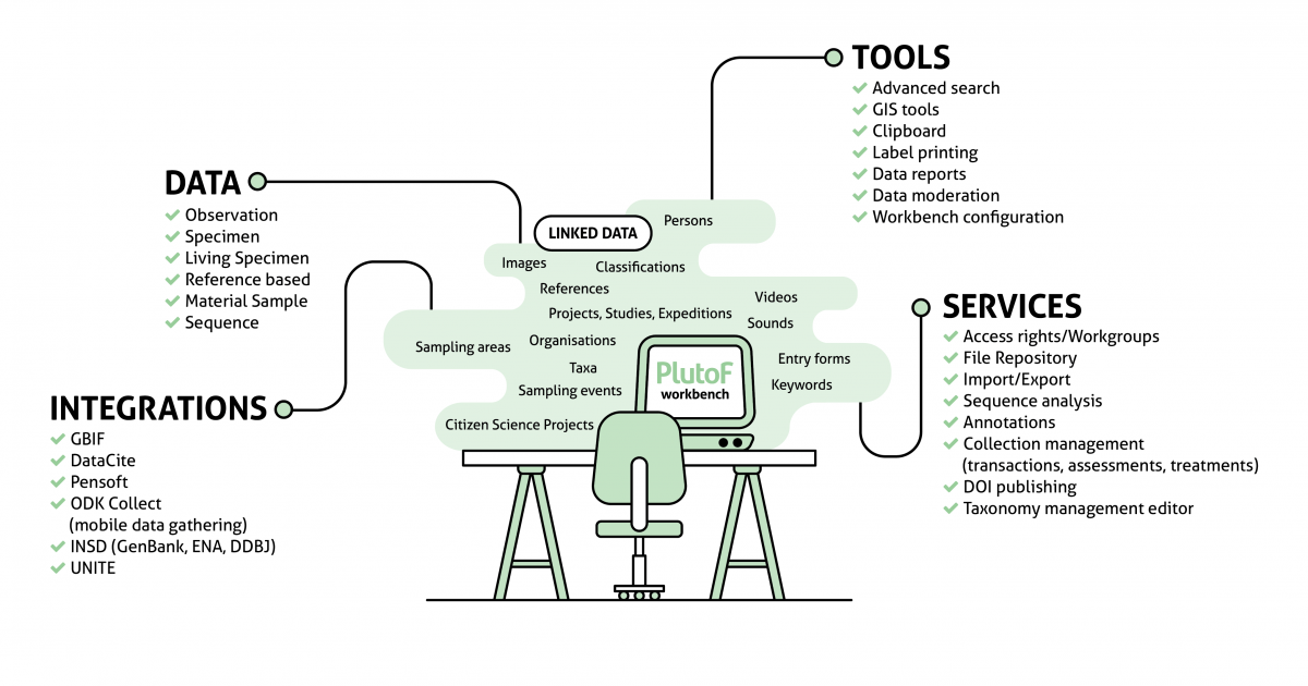 Portaali PlutoF illustreeriv joonis.